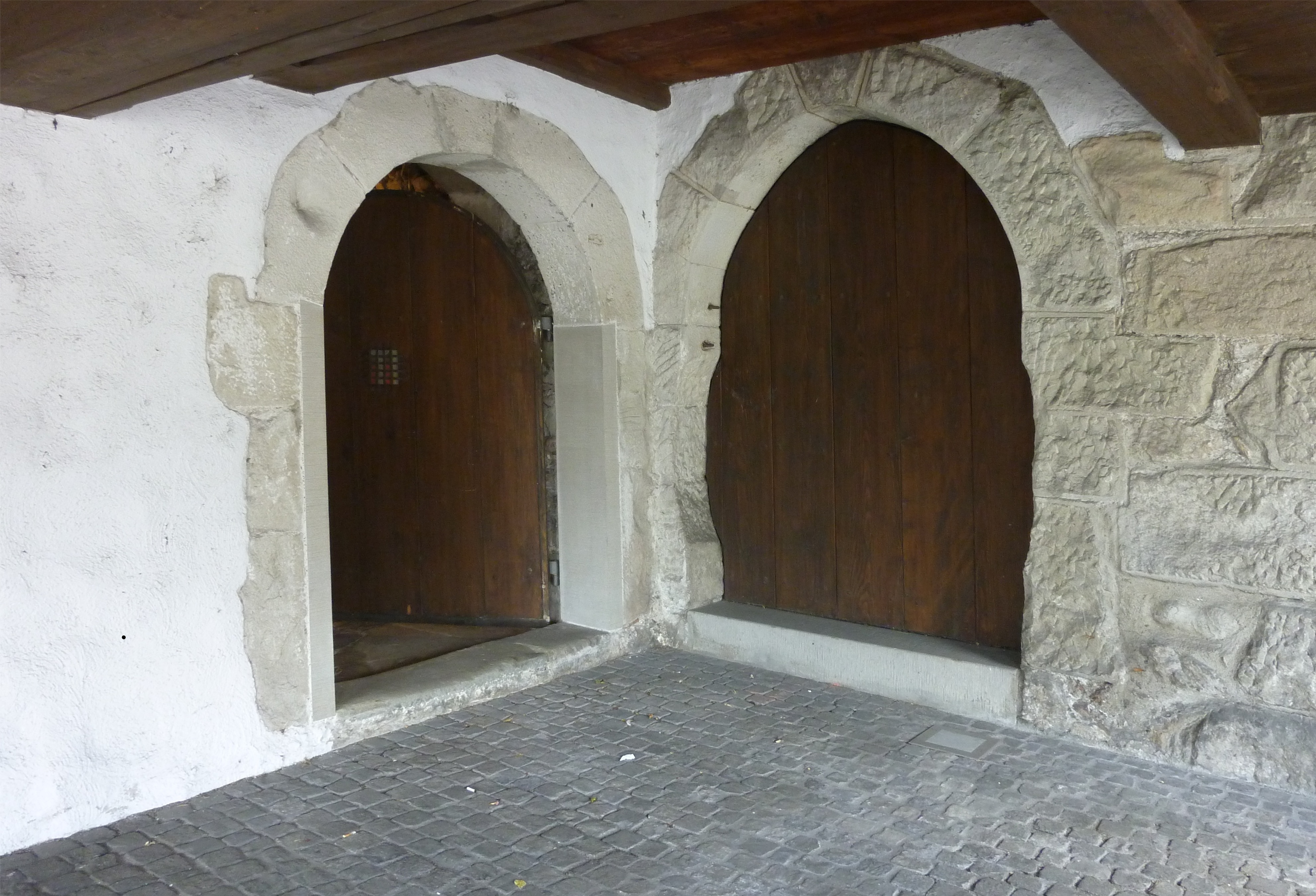 Höchhus Küsnacht: Eingänge zum Keller